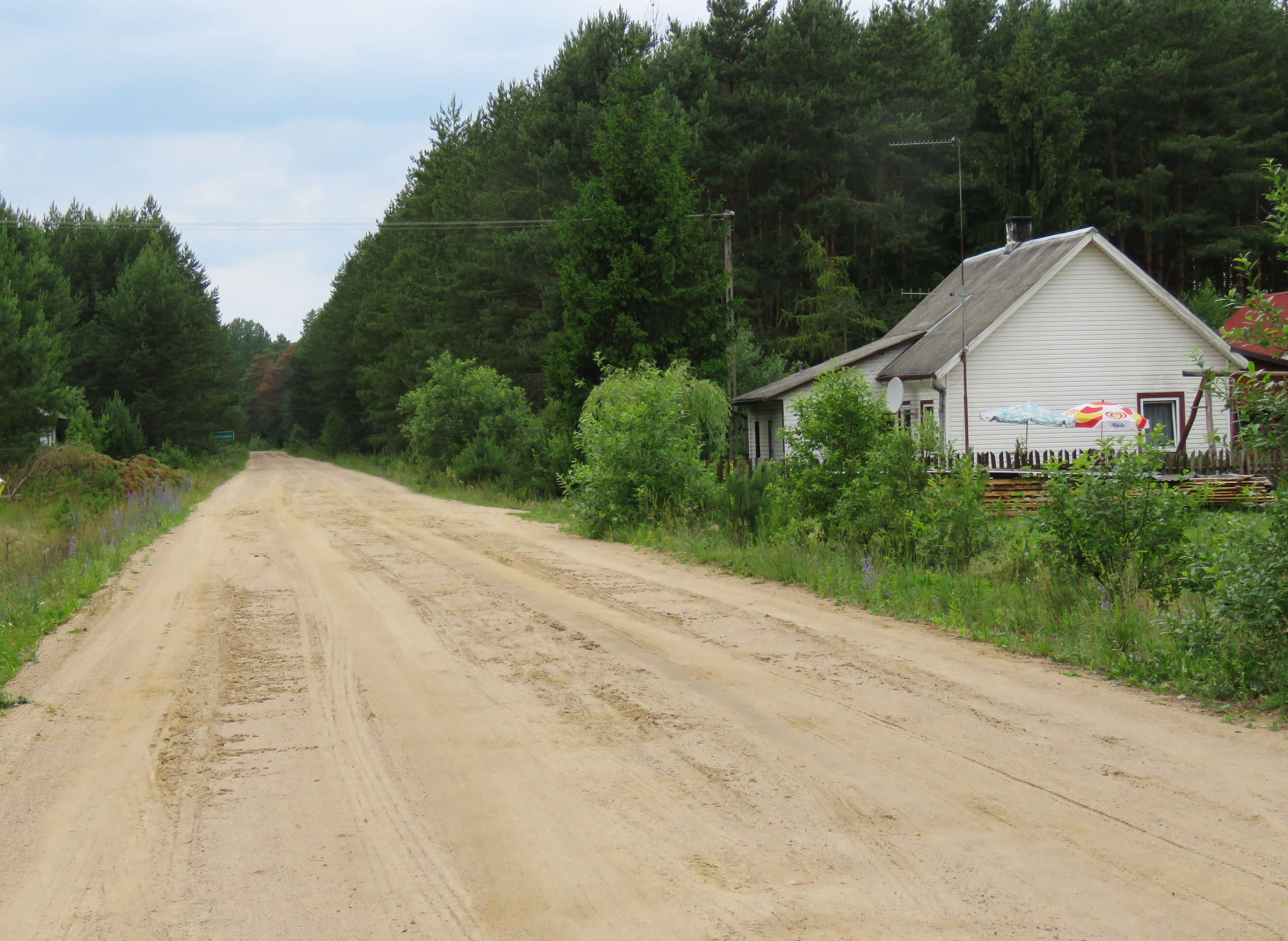 Grabowiec